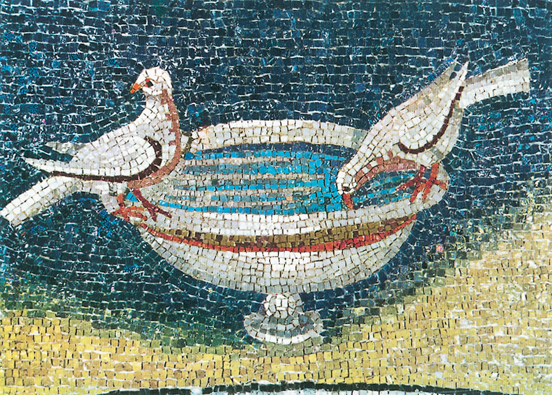 mosaic in Galla Placidia Masoleum